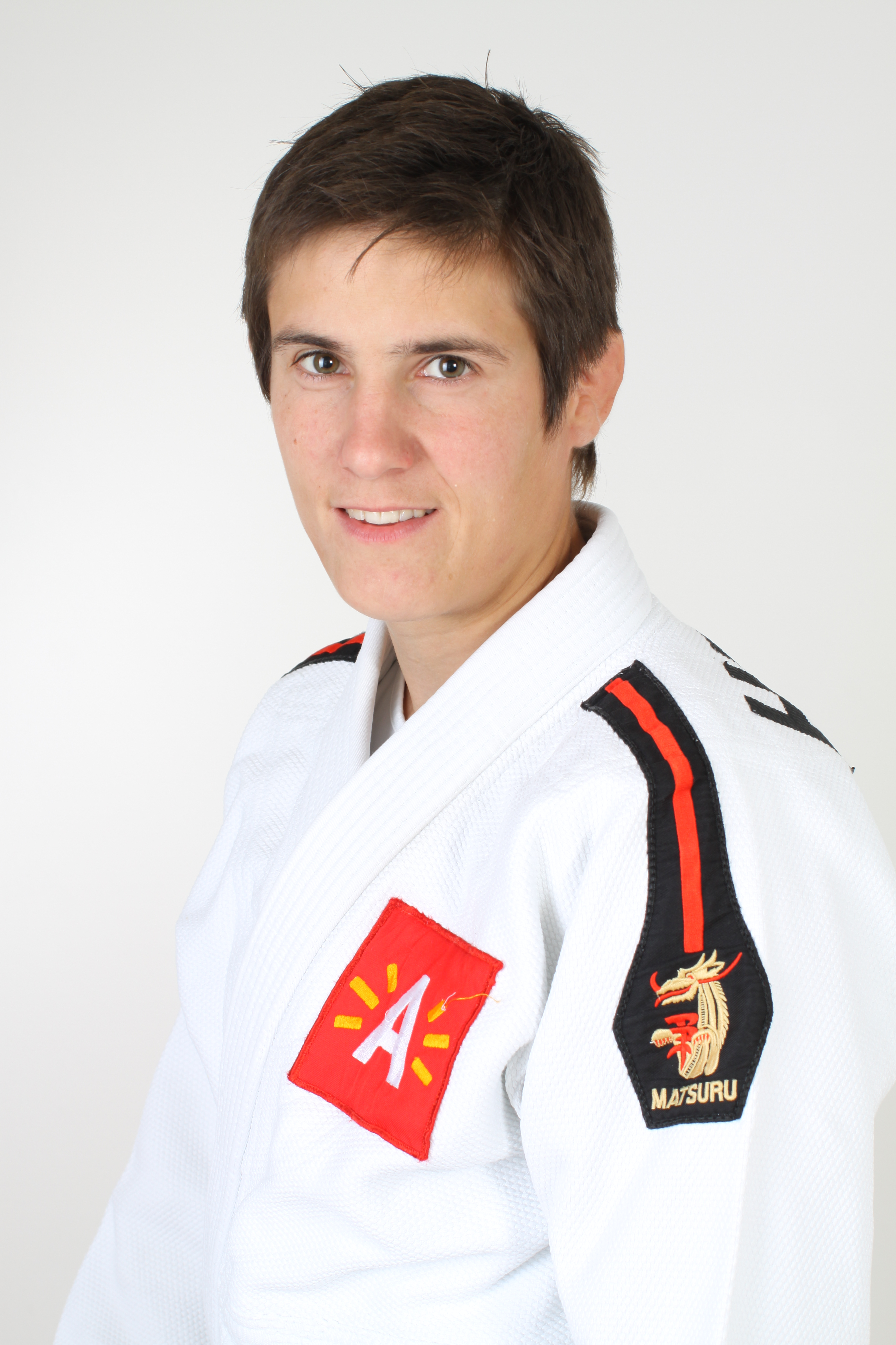 Belgisch judoka